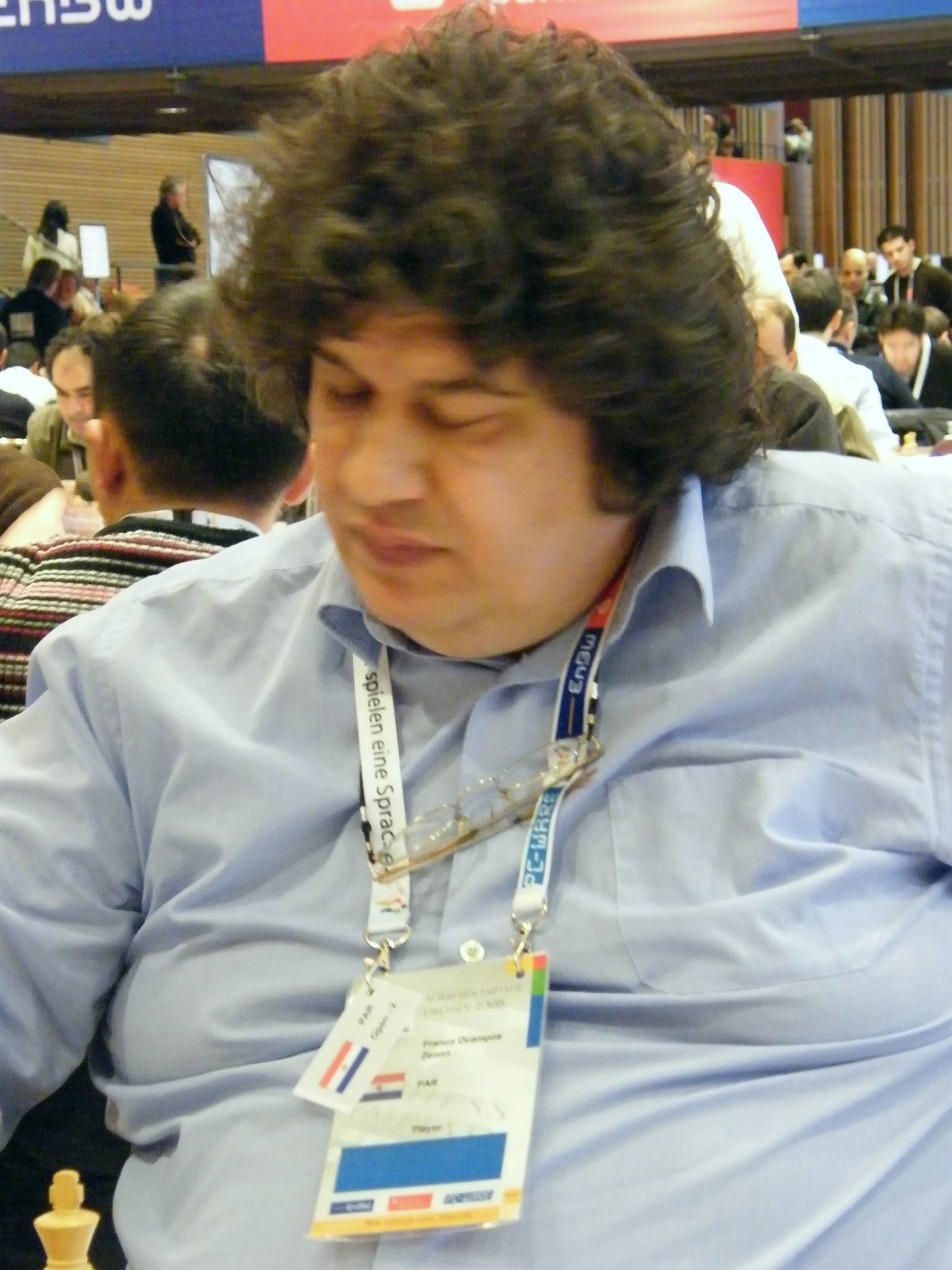 Zenon Franco Ocampos bei der 38. Schacholympiade in Dresden 2008